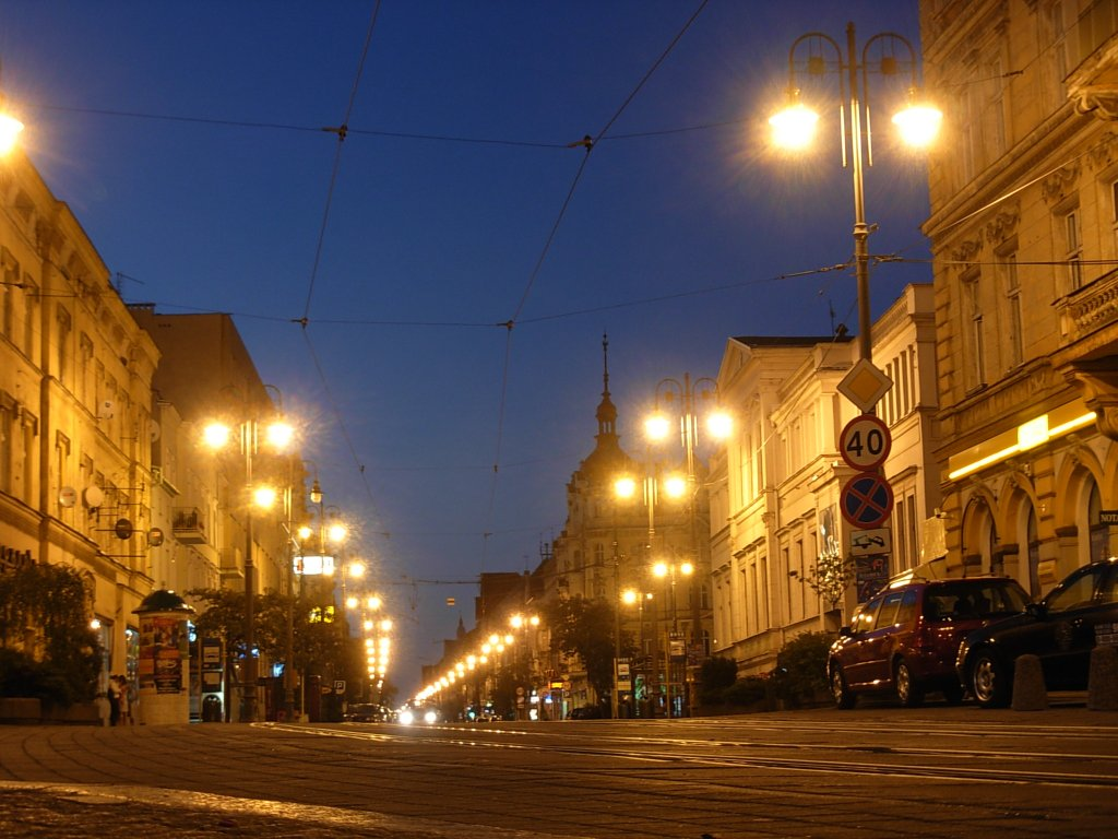 Ulica Gdańska w Bydgoszczy